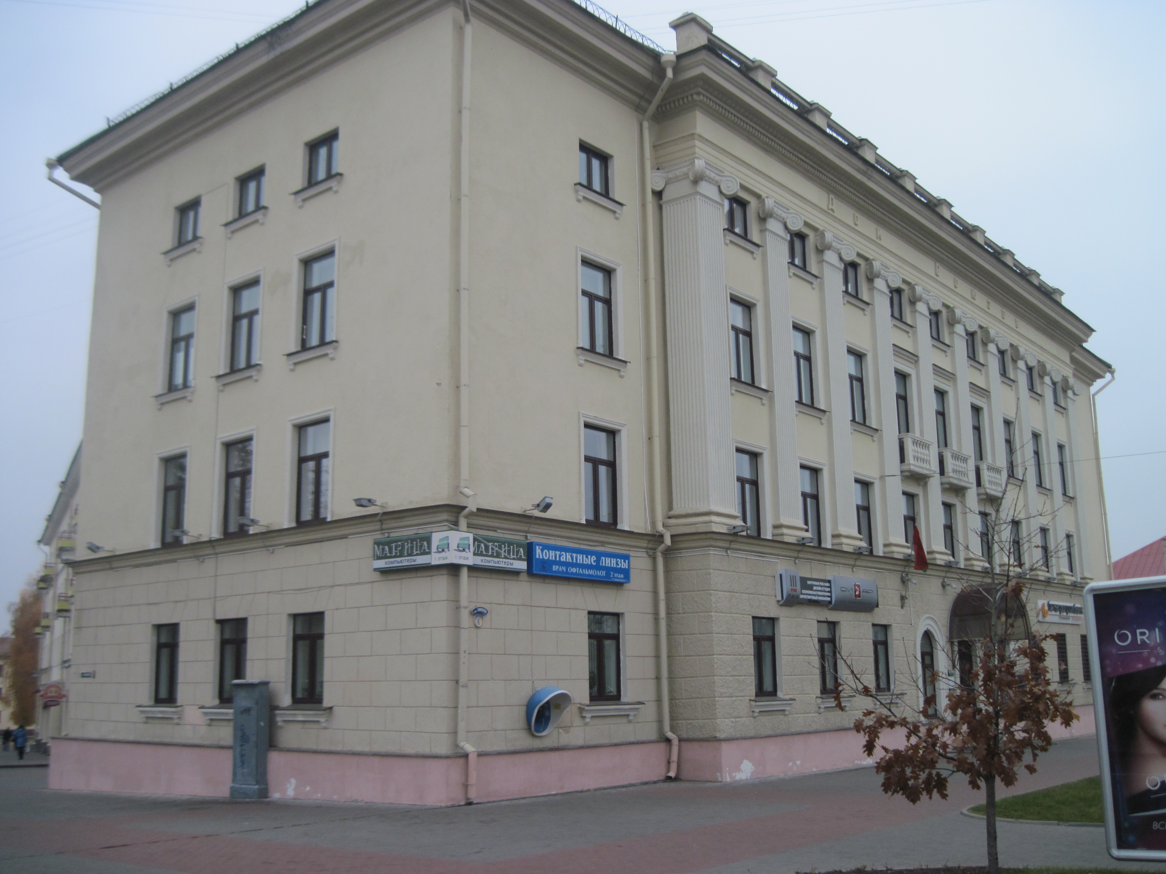 Беларуская (тарашкевіца): Здымак палаца прафсаюзаў у Гродне, Савецкая, 4